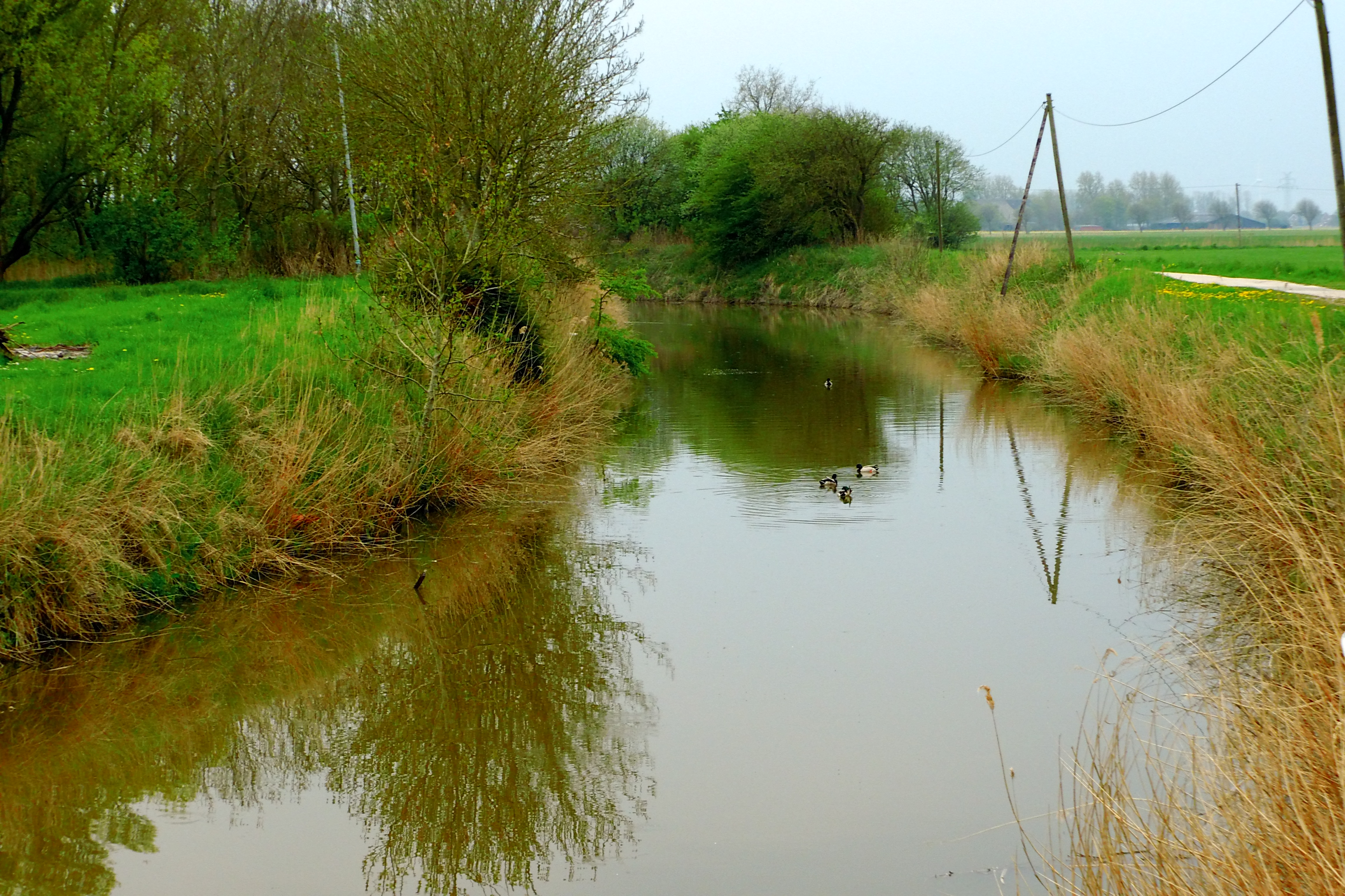 Manslagter Tief bei Visquard, Gemeinde Krummhörn, Niedersachsen, Deutschland